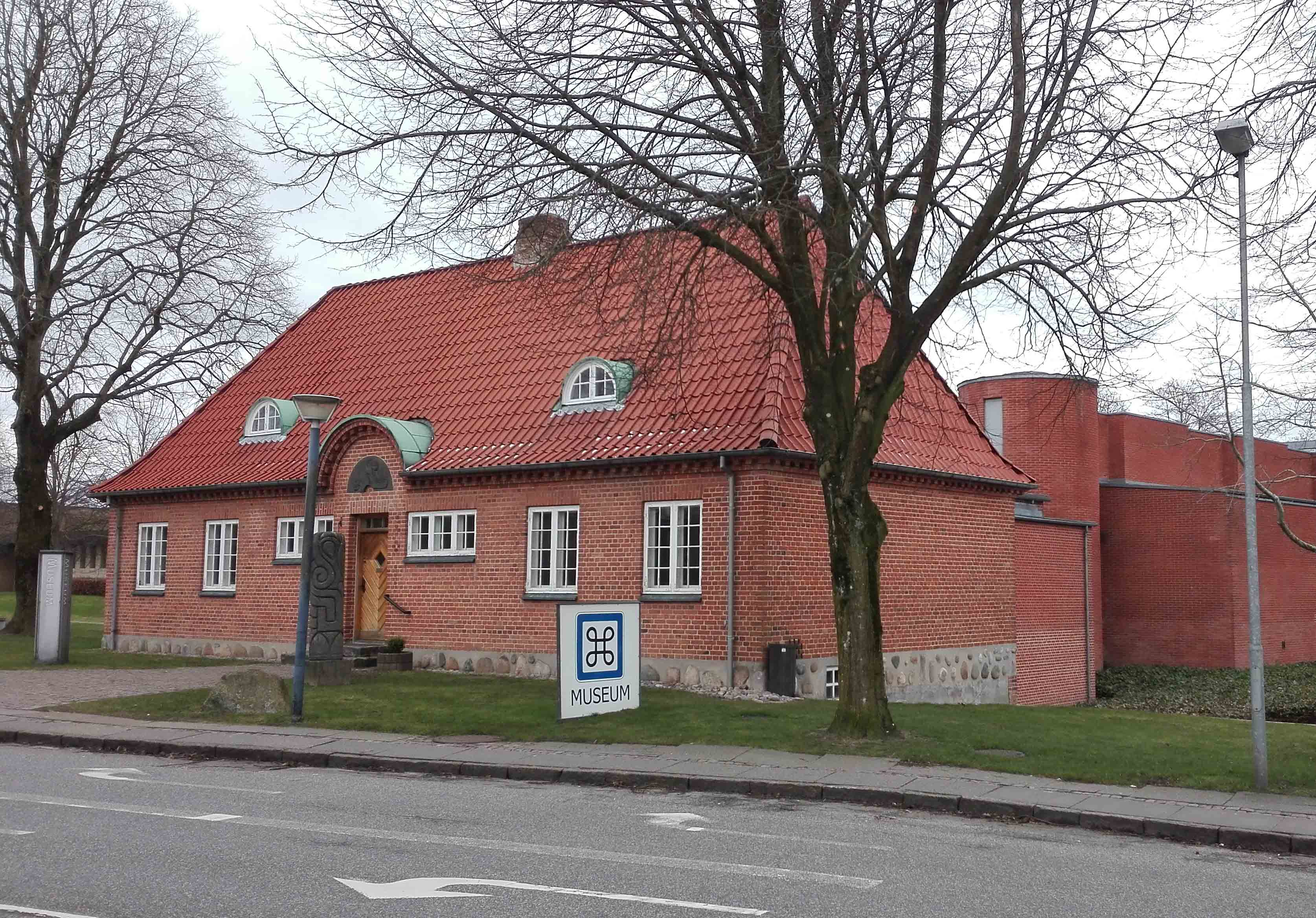 Vesthimmerlands Museum i Aars